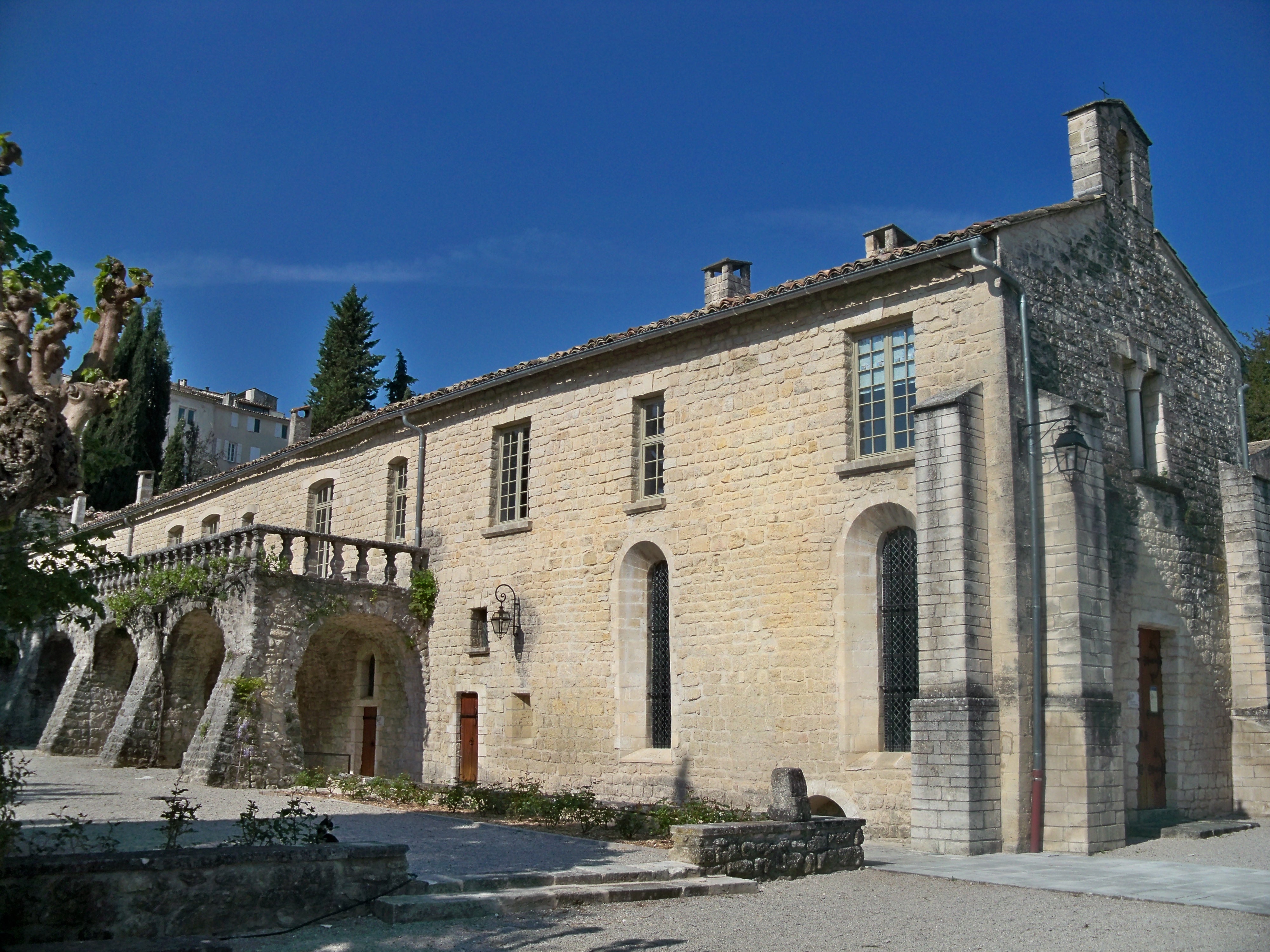 Chapelle du couvent des cordeliers de Forcalquier (04), actellement siège de la Férédétion des Bistrots de Pays .